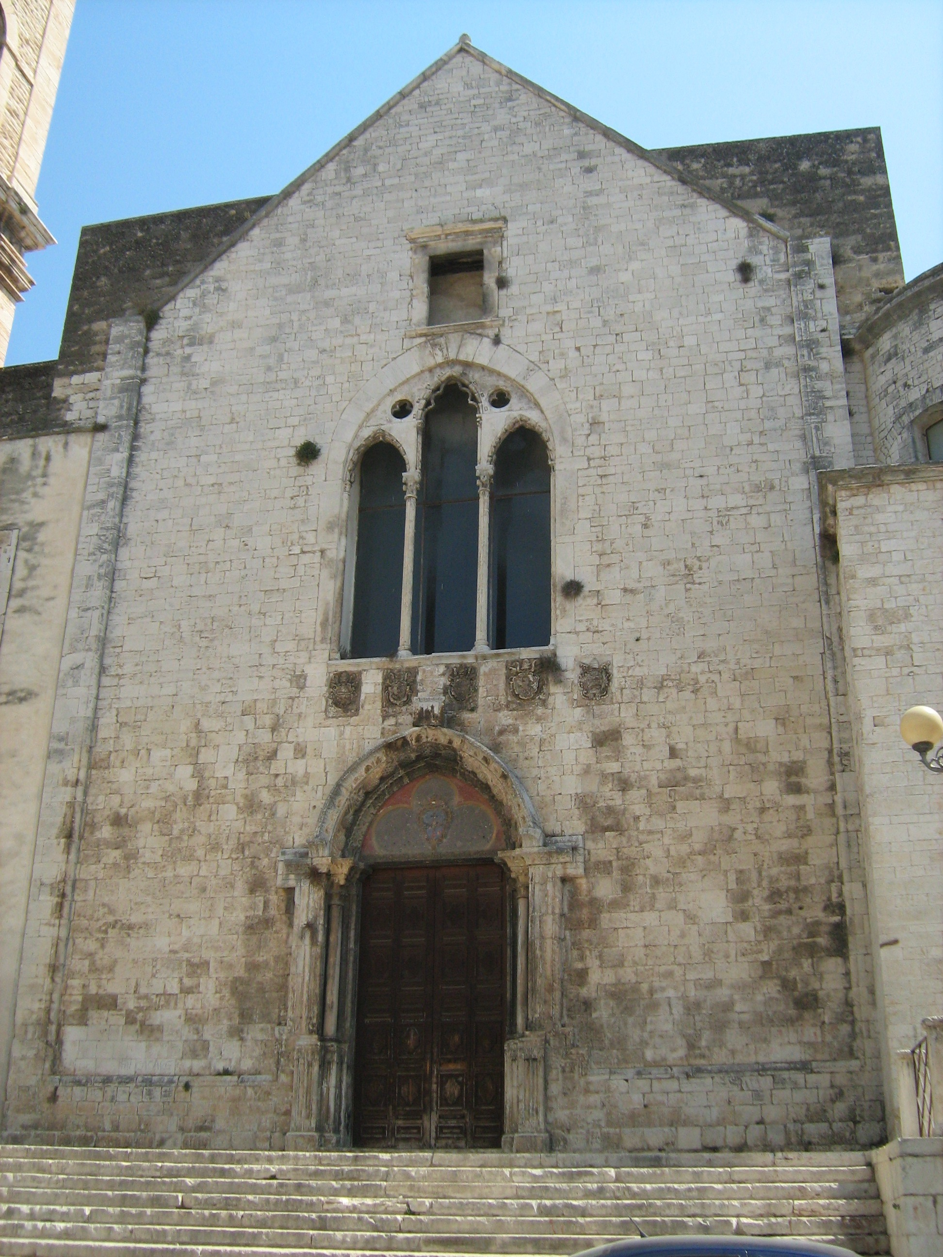 Chiesa di San Francesco alla Scarpa, Bitonto BA, facciata (1280 circa)